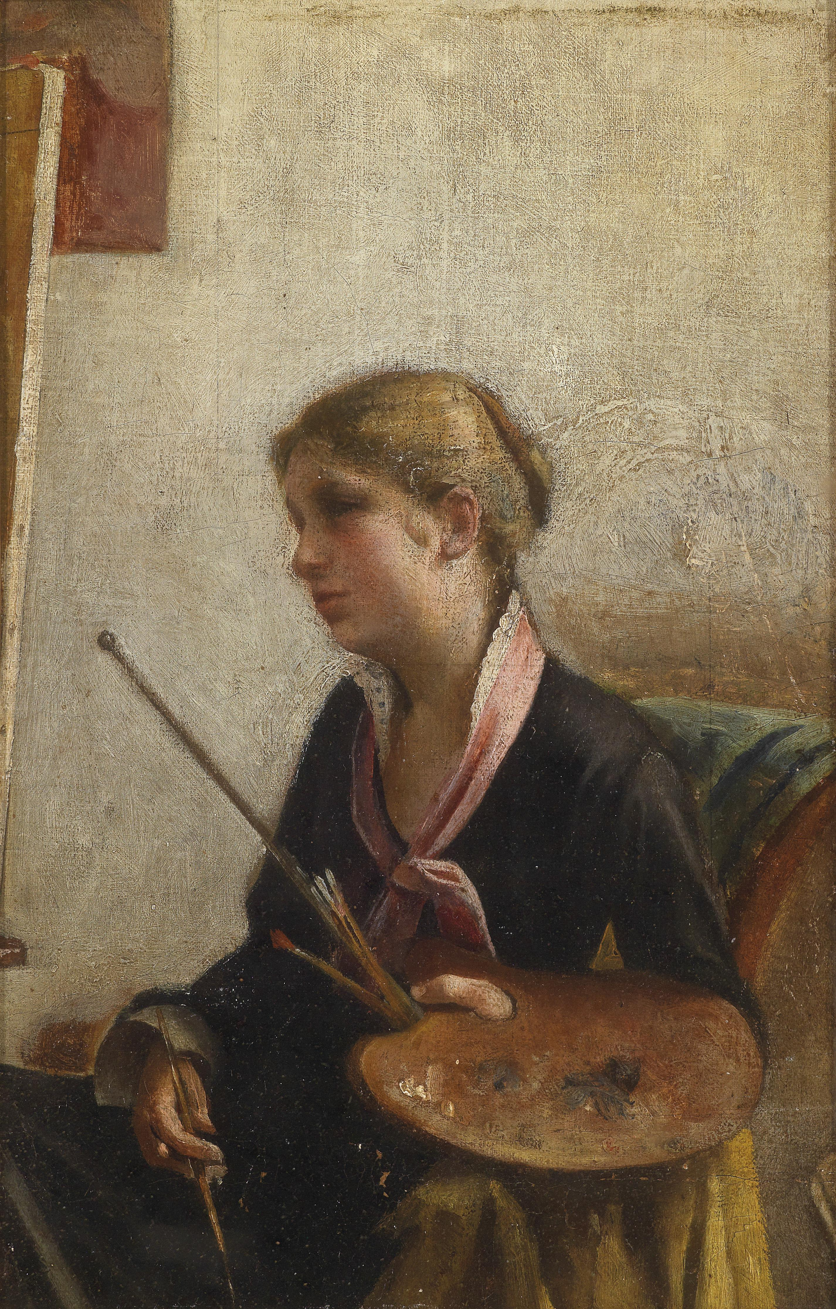 Eine Malerin vor der Staffelei, Öl auf Leinwand auf Karton, 27x 17,7 cm